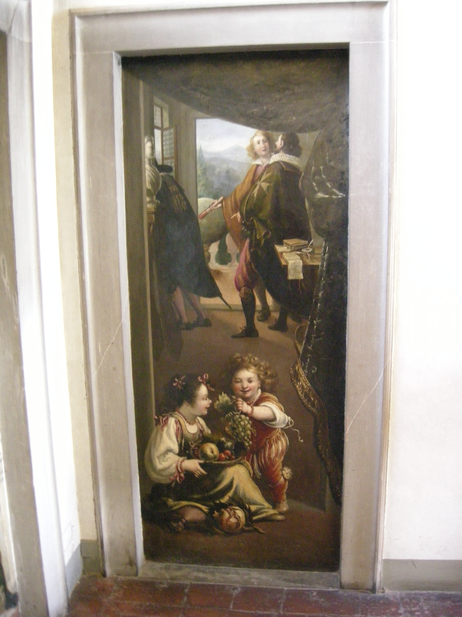 Casa buonaroti, camera della notte e del dì, 26 baccio del bianco